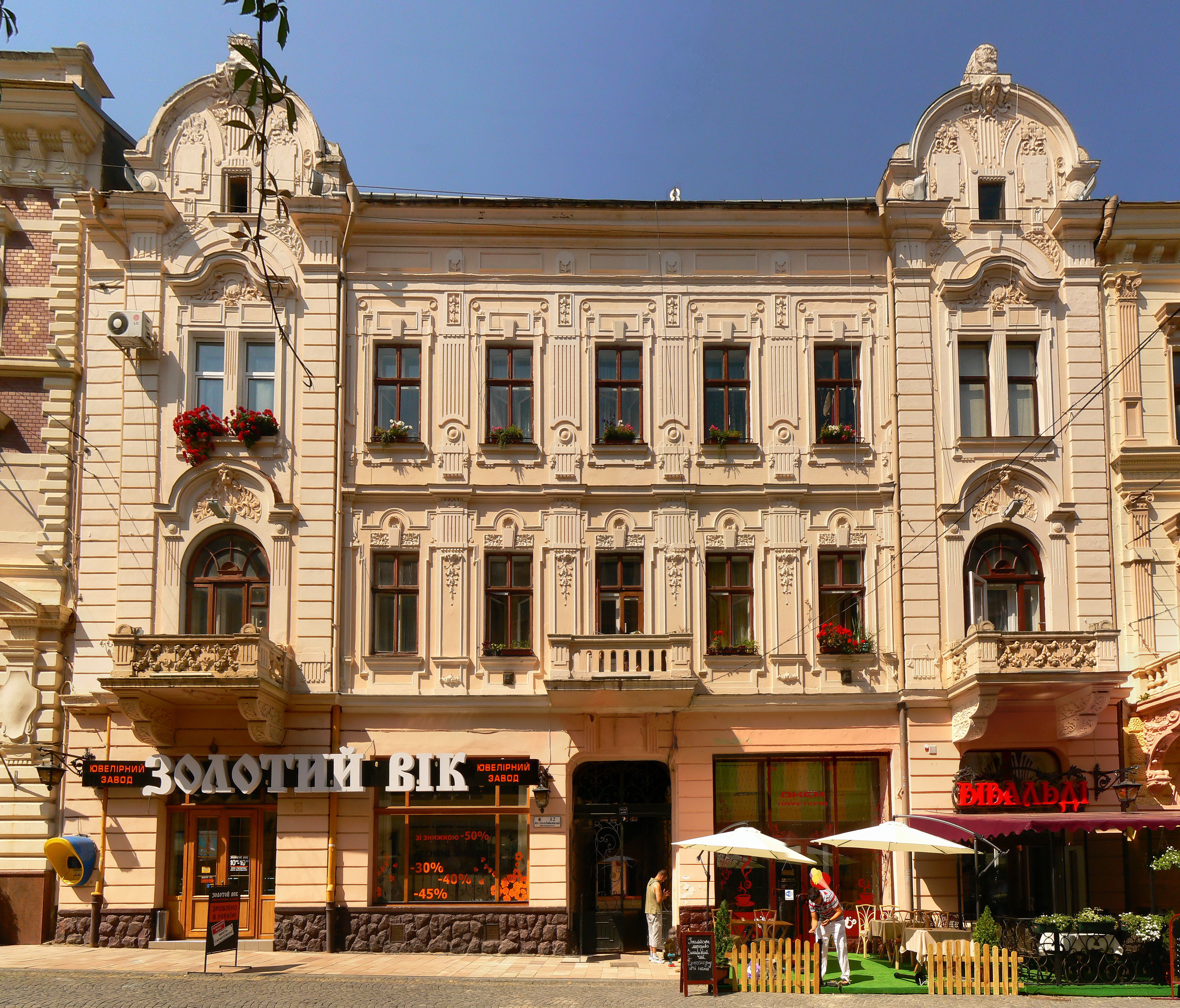 Кобилянської, 12